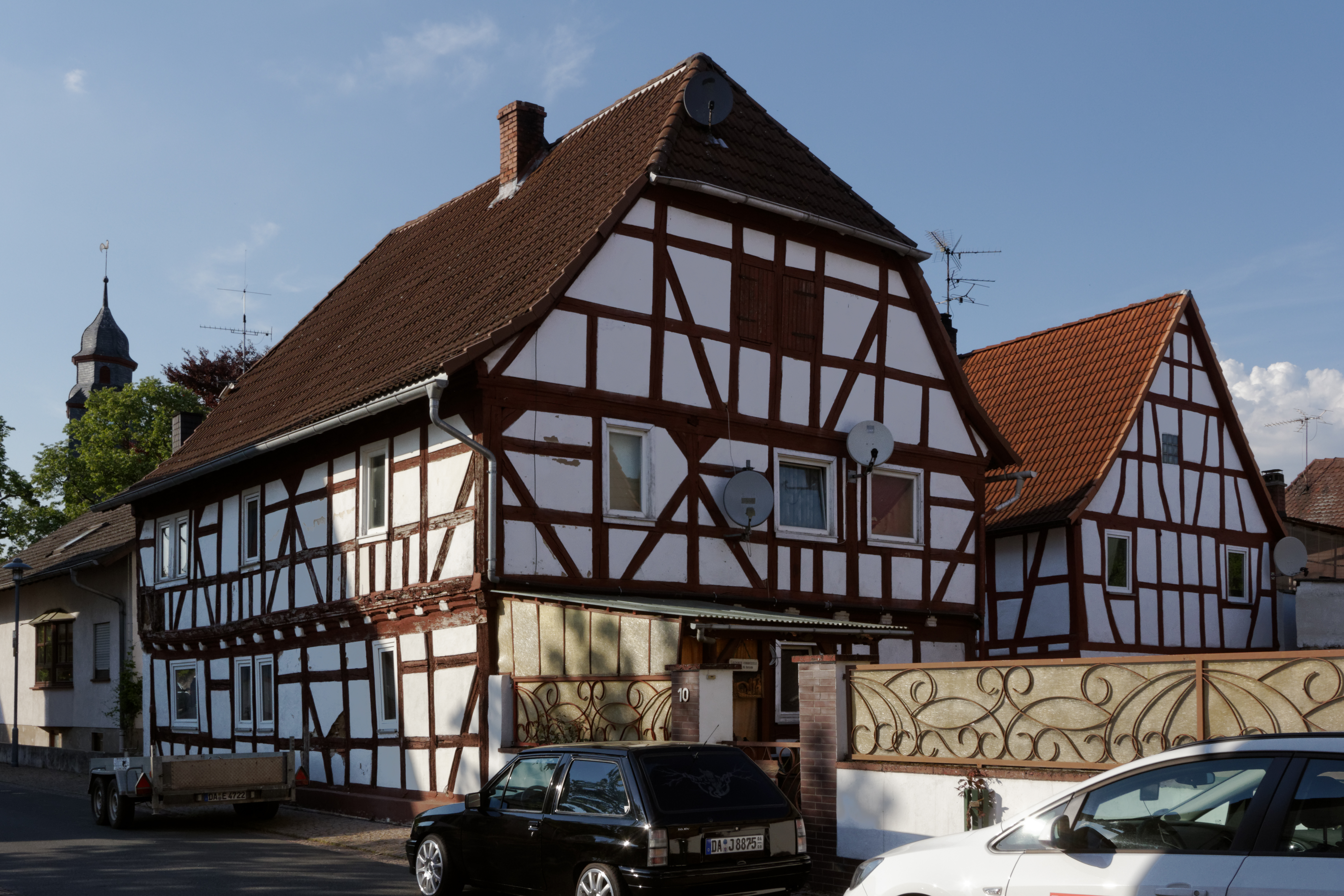 Fachwerkhaus aus dem 17. Jahrhundert in Hergershausen, einem Stadtteil von Babenhausen (Hessen).